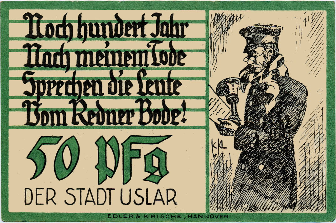 Eine Seite des Uslarer 50-Pfennig-Notgeldscheins (1921/22).